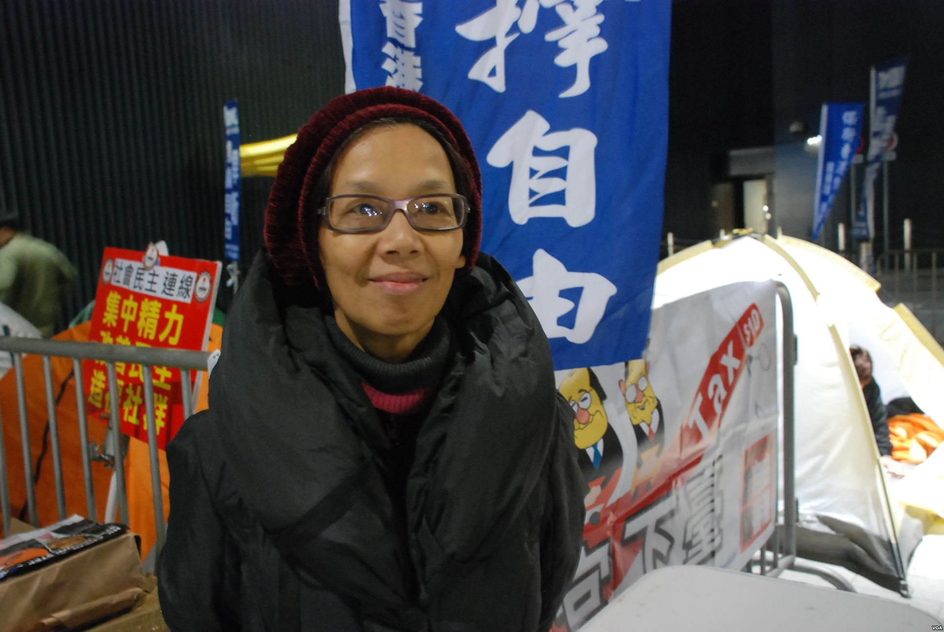 HO Chi-kwan